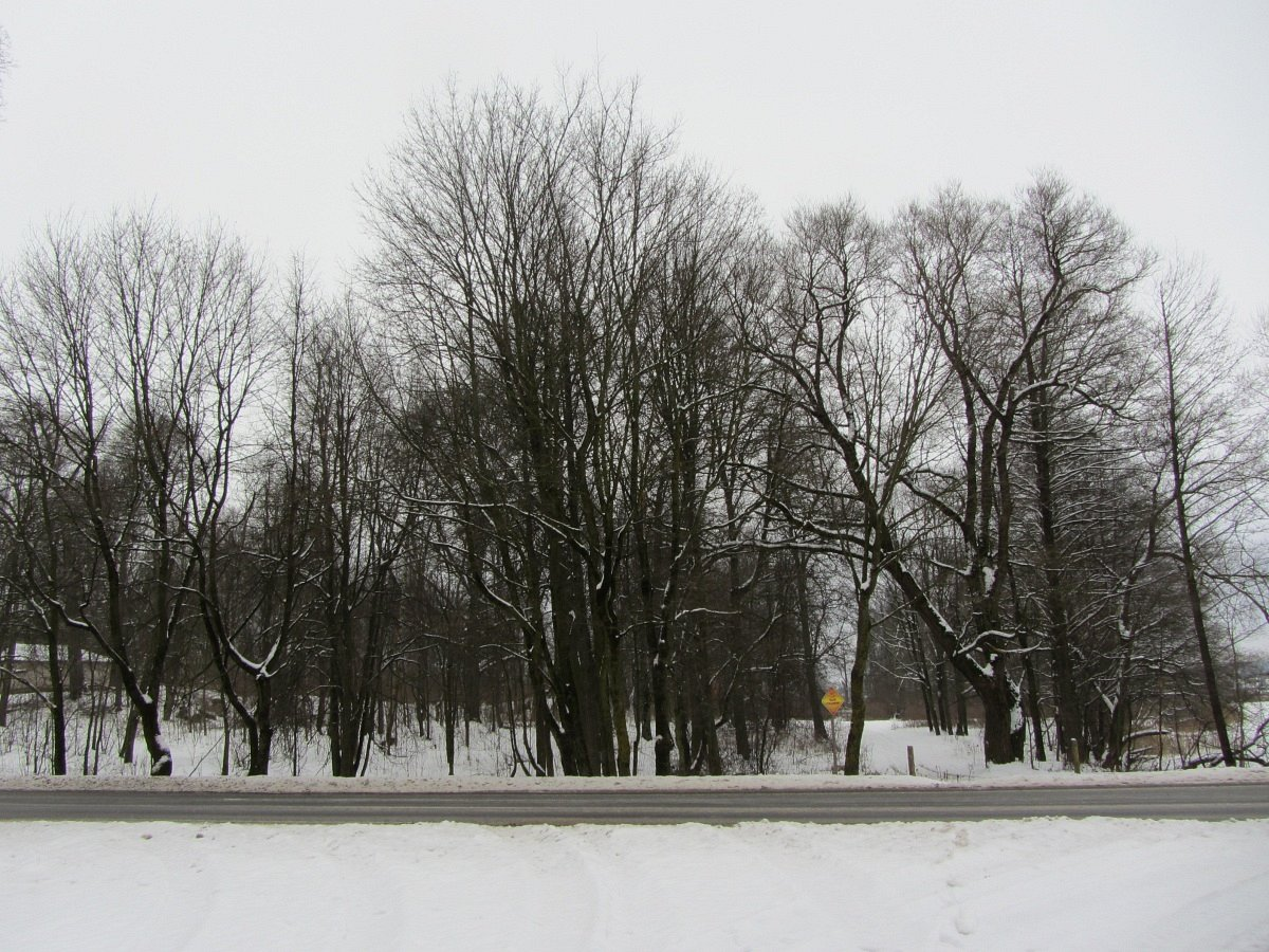 Раванічы. Парк